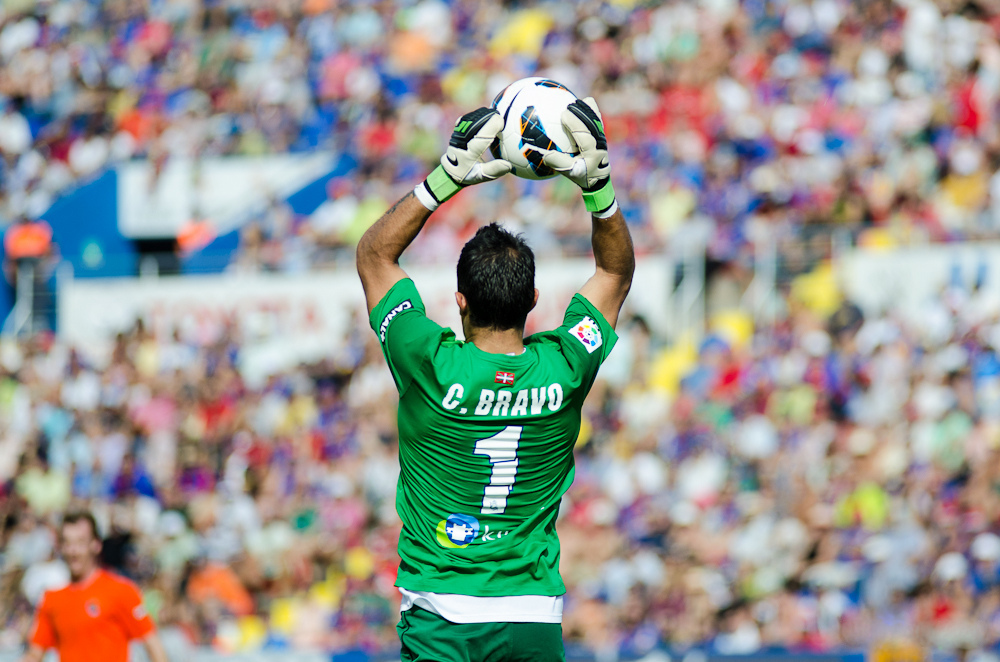 Llevant-Erreala.